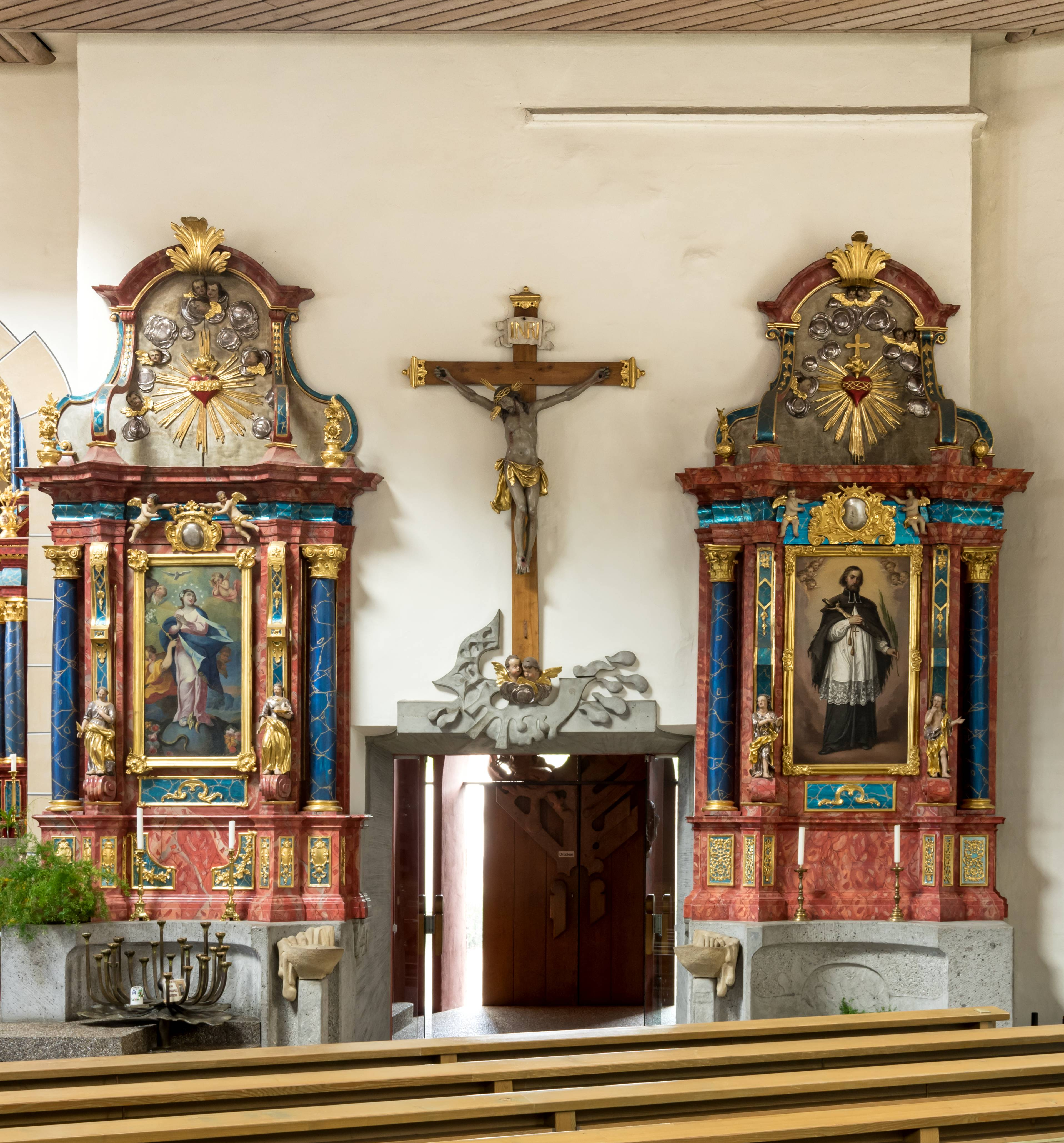 Bilder von St. Columba. in Pfaffenweiler Die beiden Seitenaltäre und das Kreuz. Auffalend das beide Seitenaltäre rechts vom HAuptaltar angeordnet sind, dies ist wegen des Freskos welches links vom Hauptaltar freigelegt wurde.